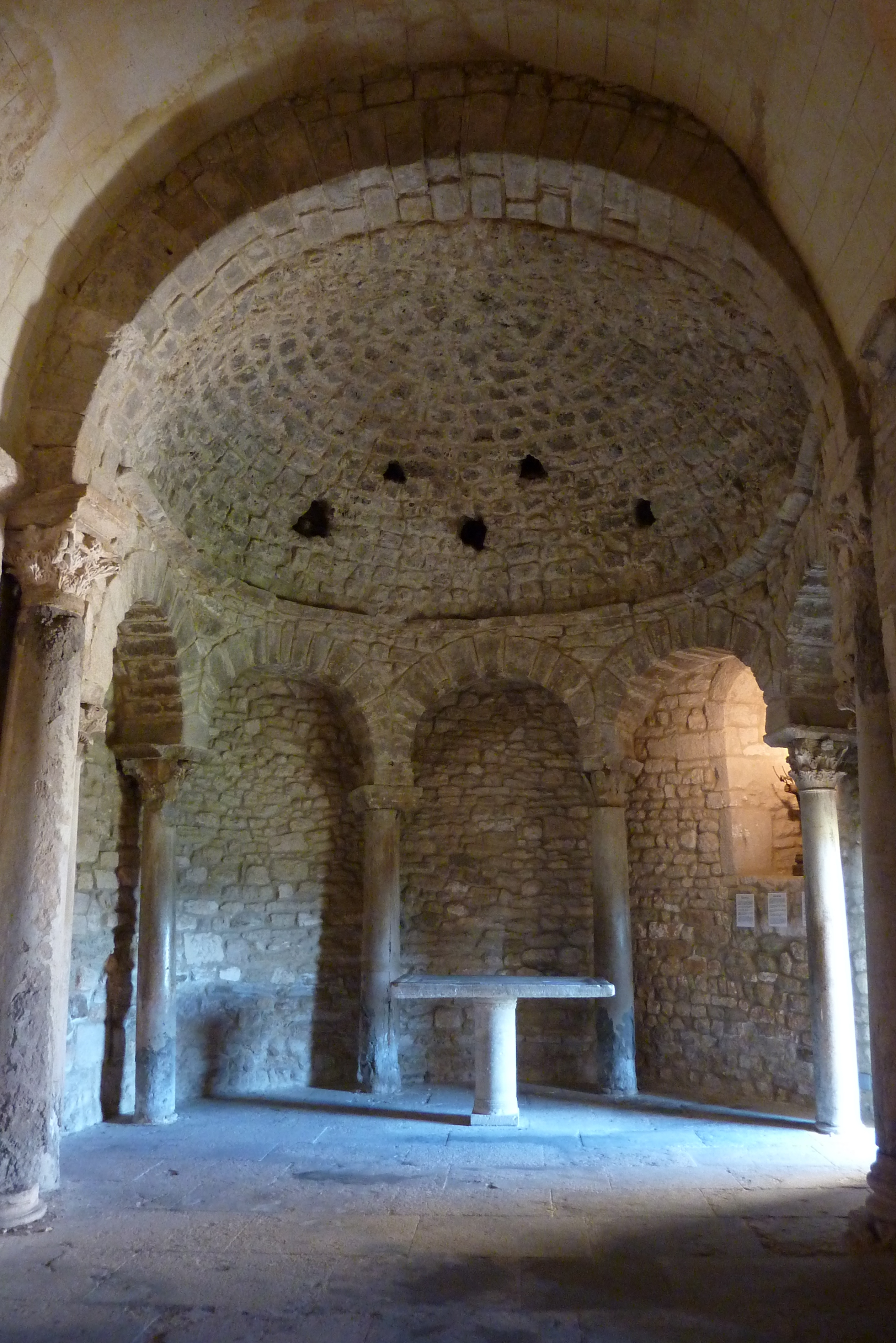 Baptisterium in Venasque